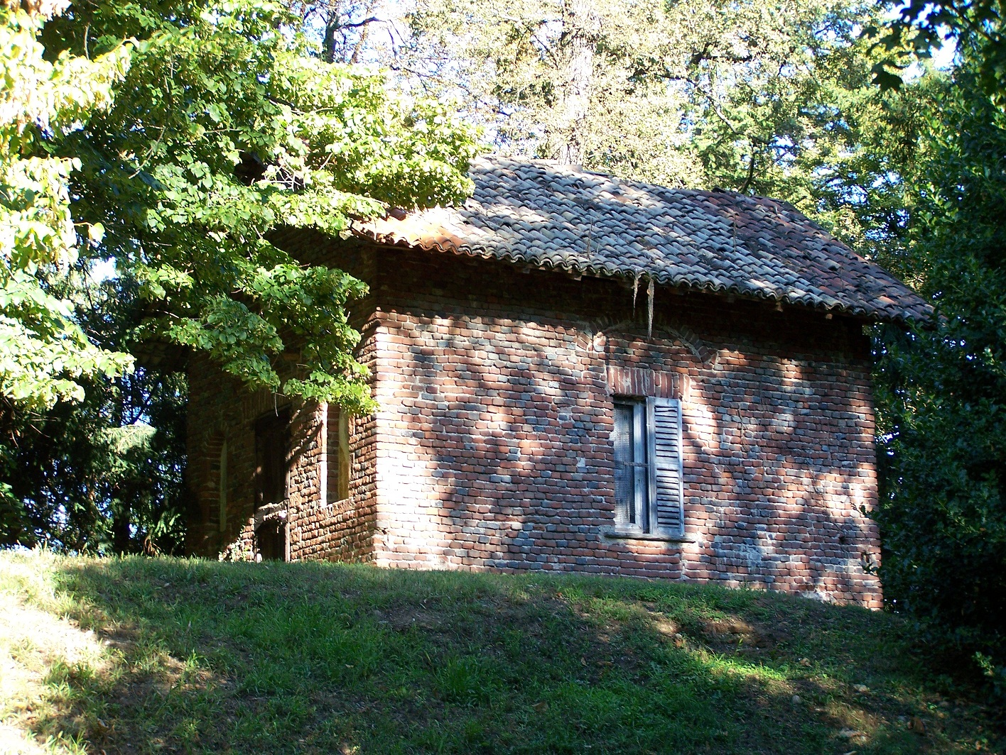 La Coffee House di Villa Annoni a Cuggiono (MI) - Italy